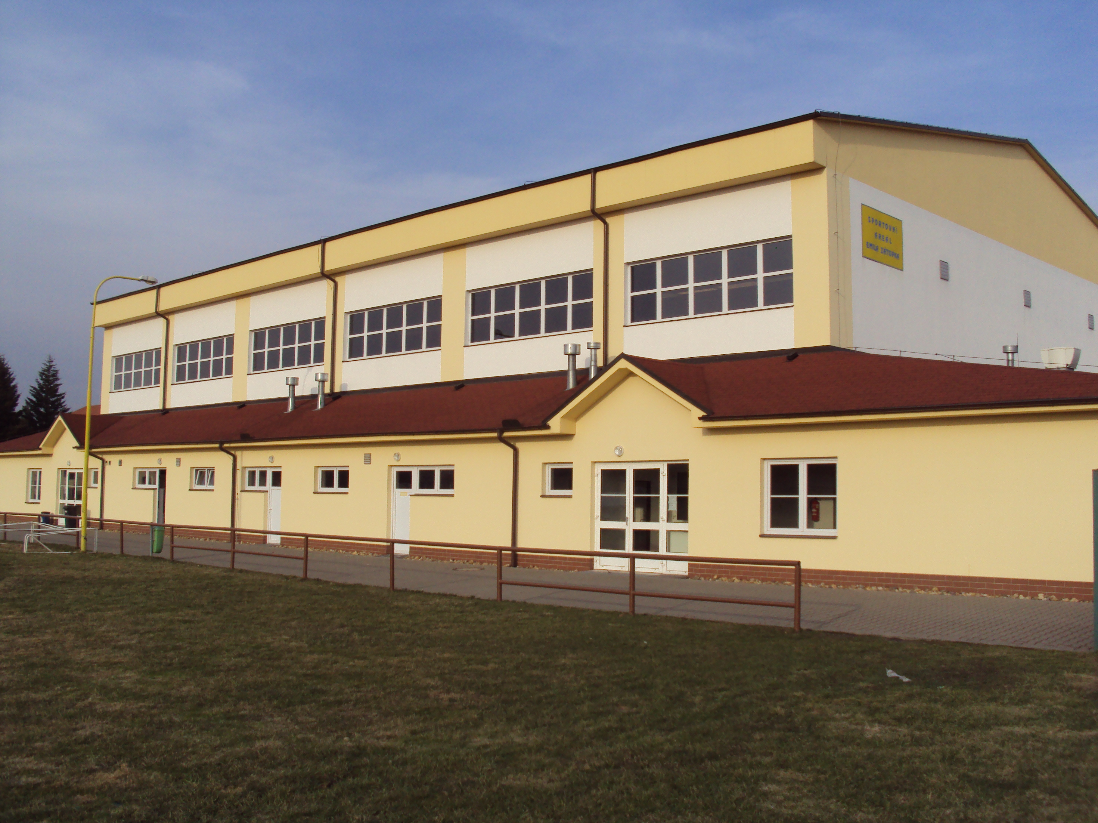 Sportovní hala Zákupy, sport.areál za školou